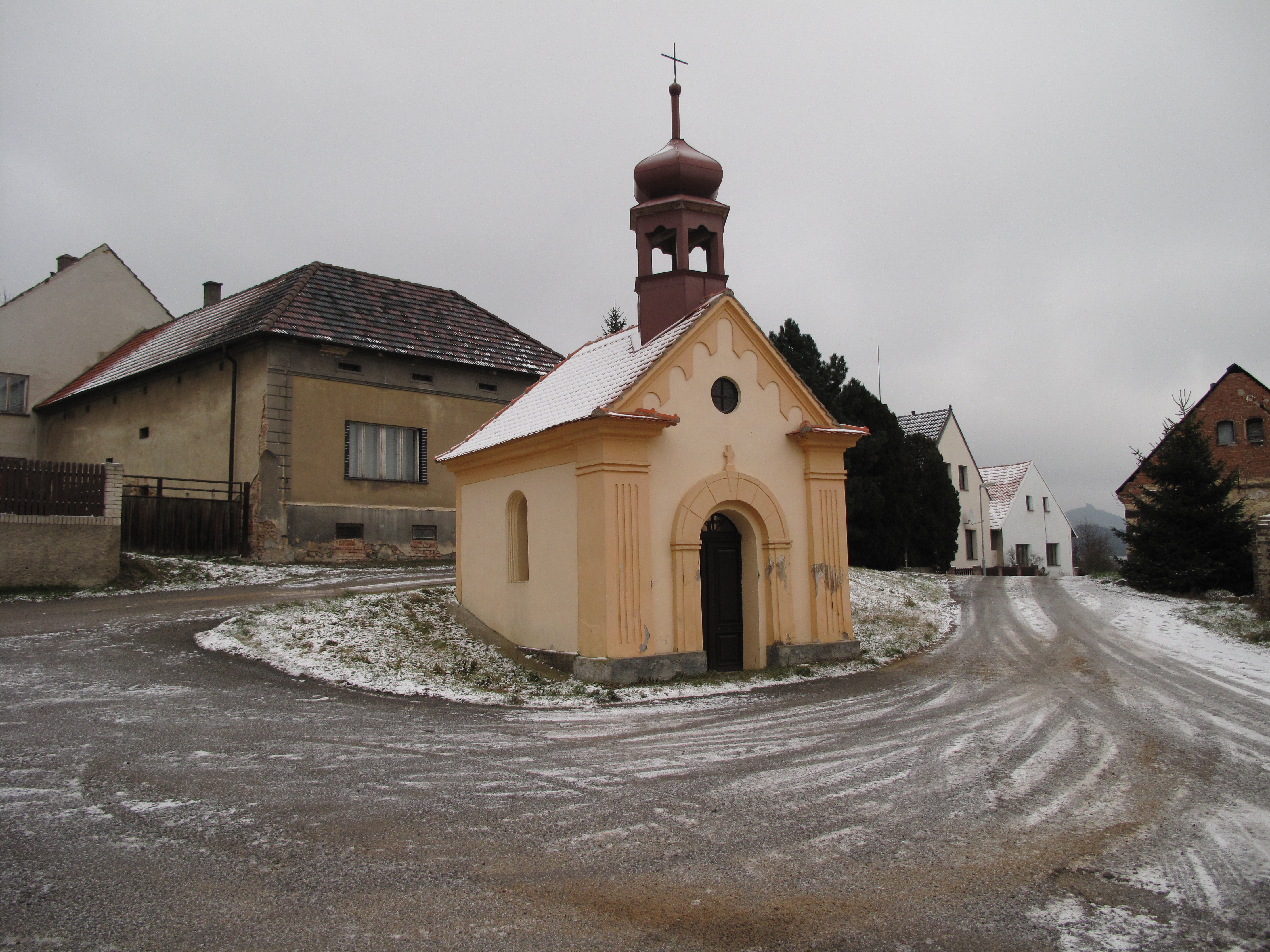 Kaplička v Lesklé. Okres Litoměřice, Česká republika.